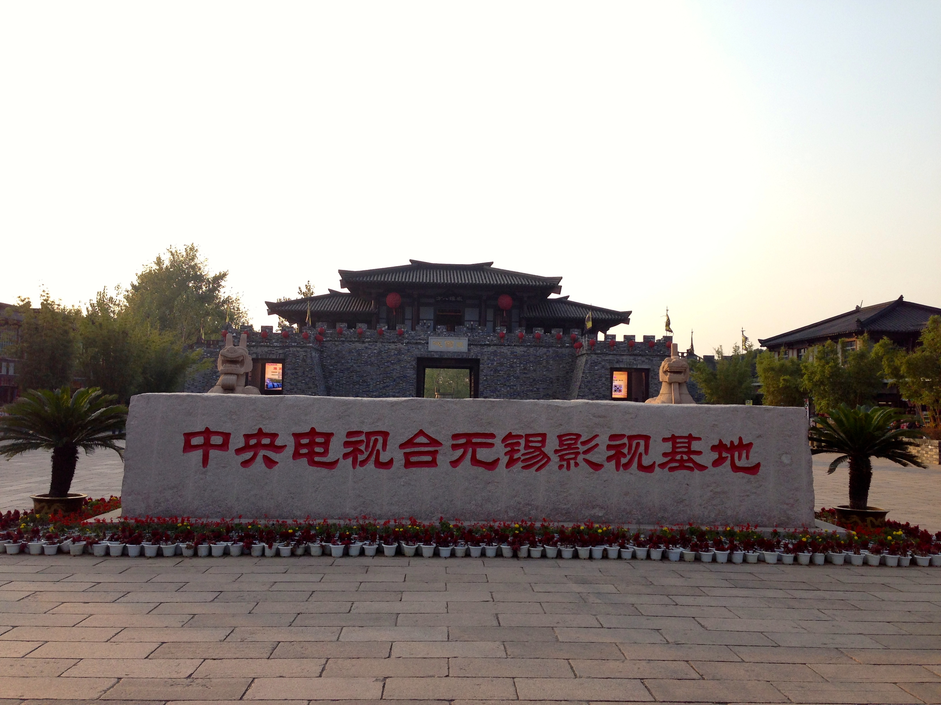 三國城